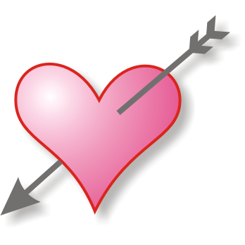 Love icon :)